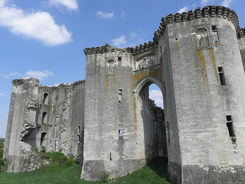 Château de La Ferté-Milon (02).